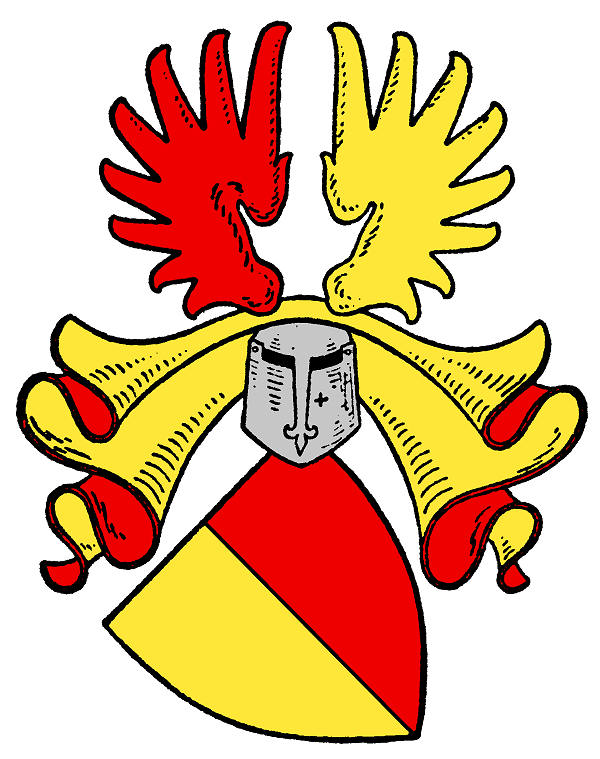 Wappen der von Erdmannsdorff (Variante in Brandenburg-Preußen)